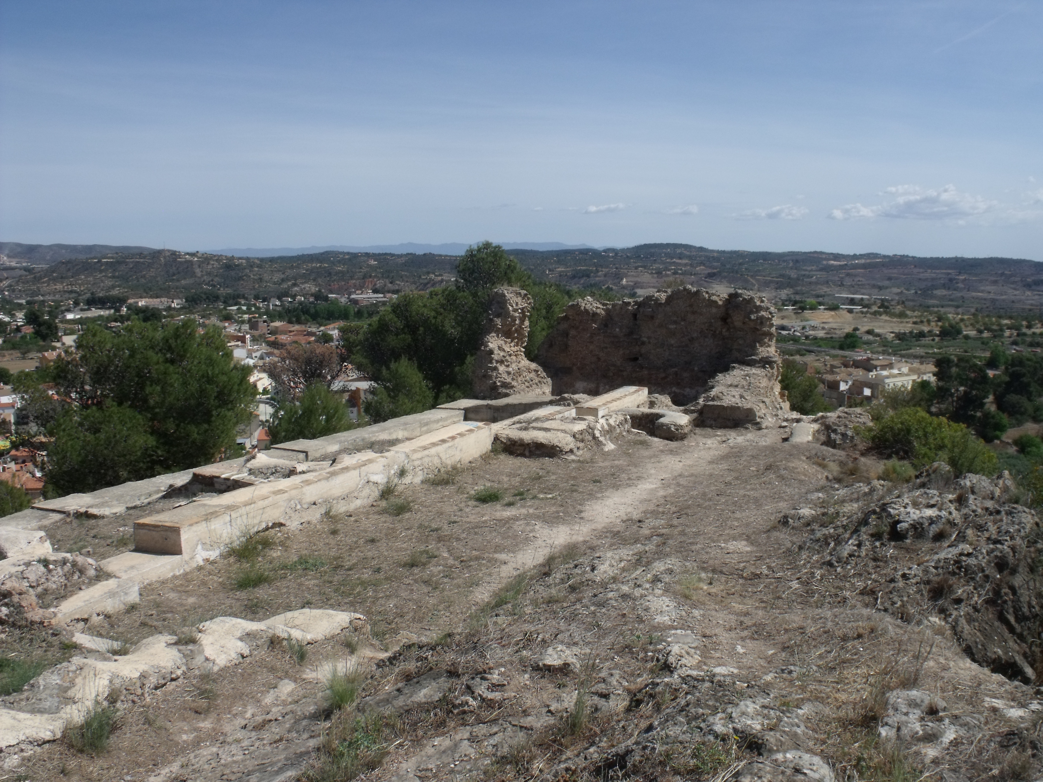 Castillo de Macastre